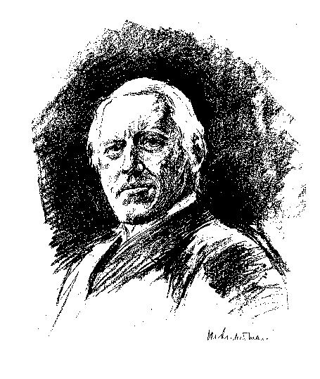 Ulrich von Wilamowitz-Moellendorff, Brustbild, Zeichnung